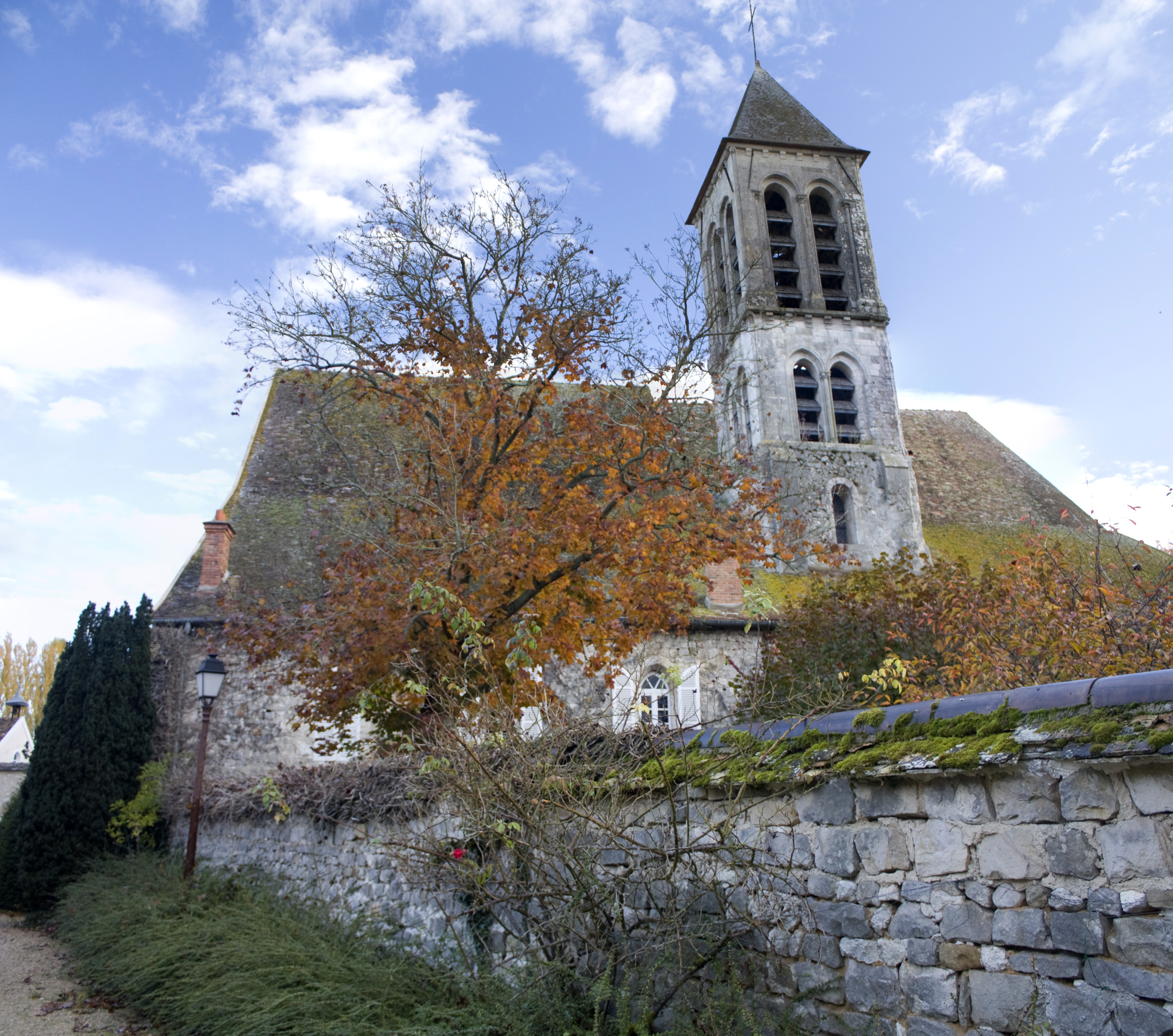 L'église et l'ancien presbytère qui y est adossé.